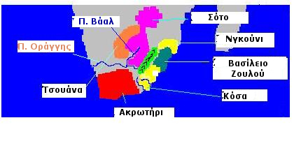 Οι λαοί Νγκούνι, Σότο, Τσουάνα, Ζουλού.